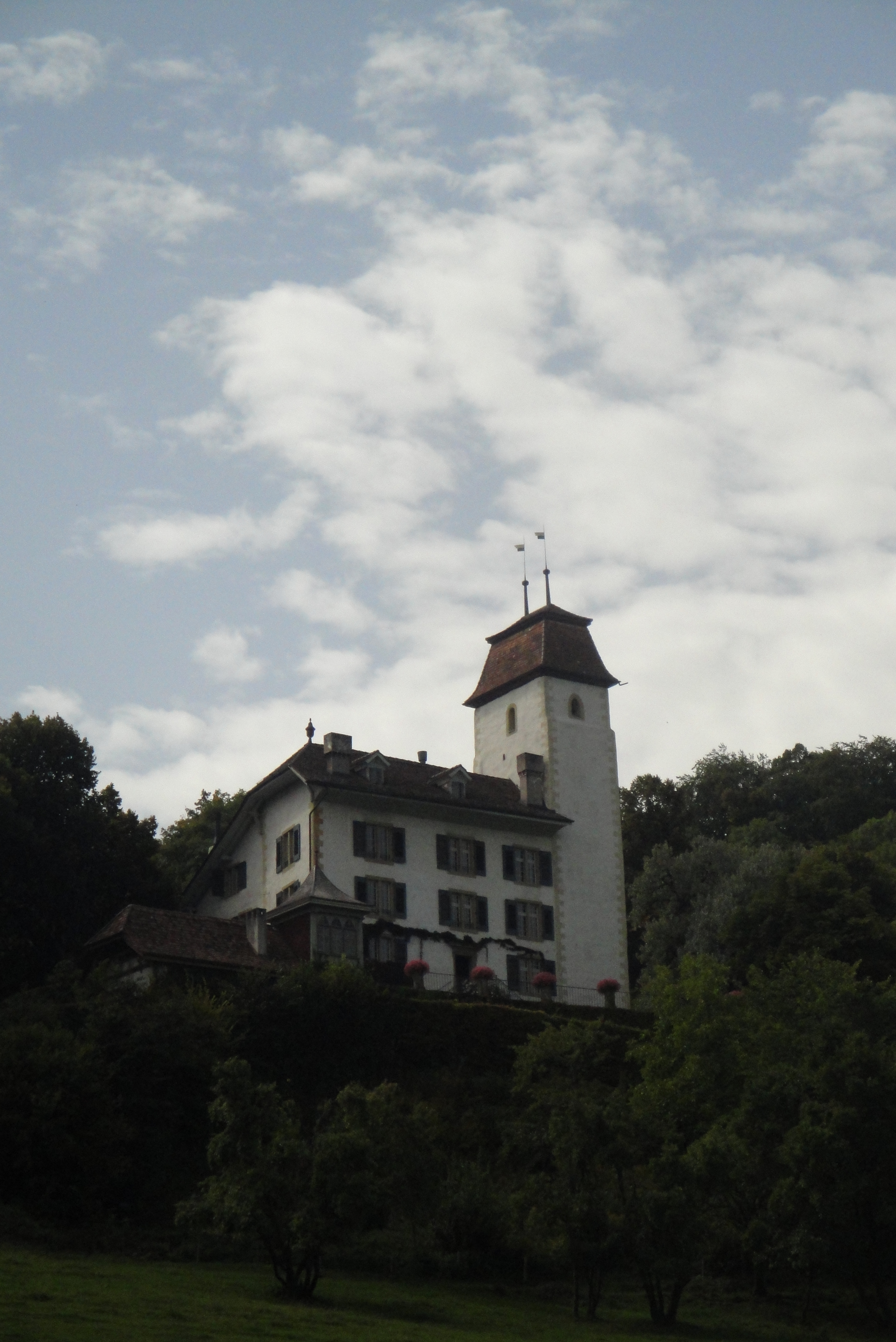 Rümligen, Schloss